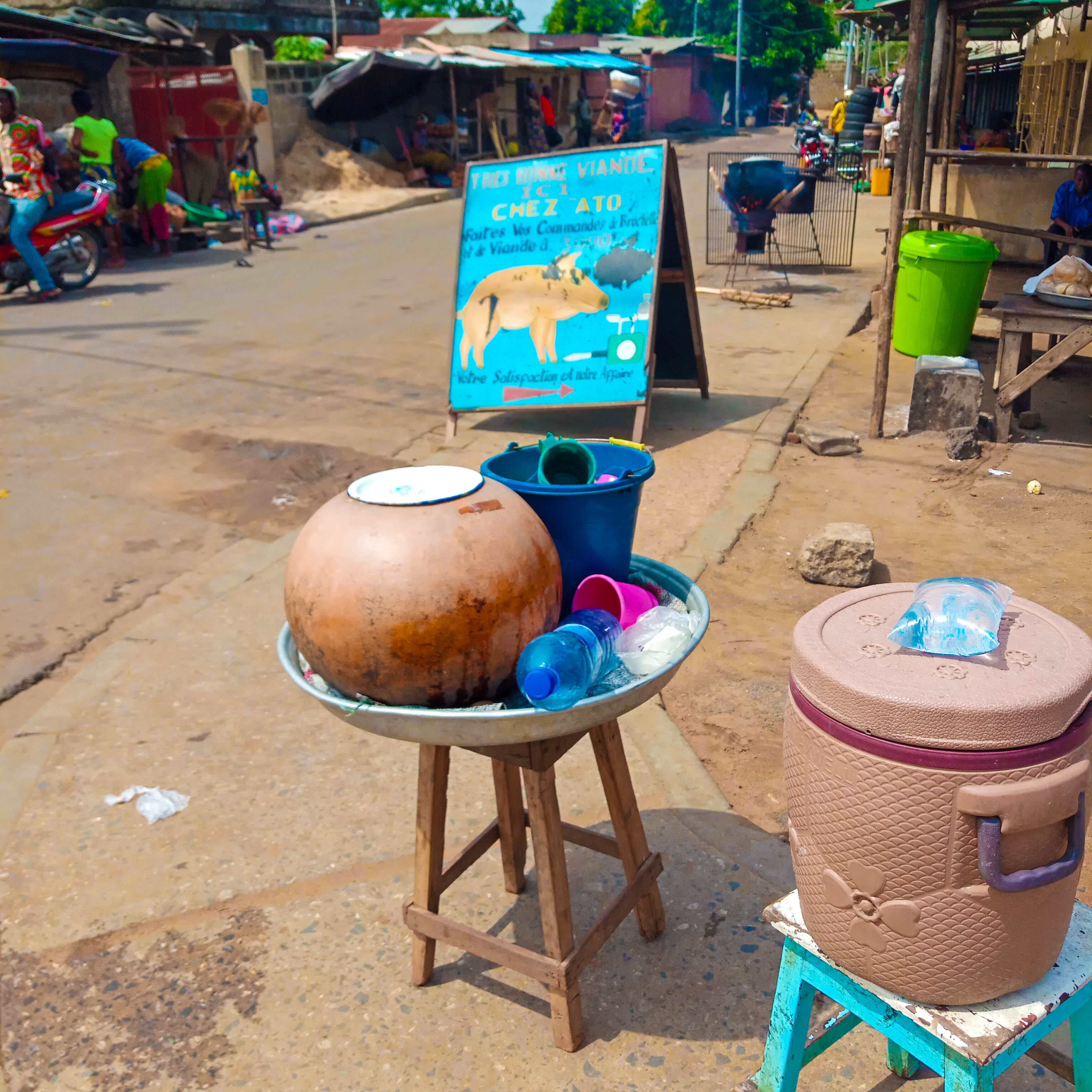 Tchakpalo